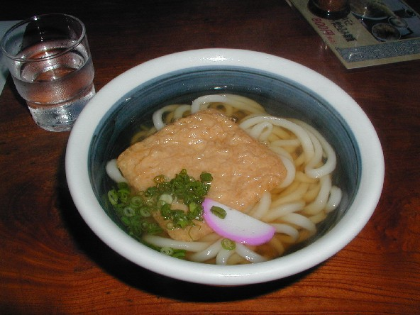 Udon. Foto scattata da me a Kotohira (Giappone) l'11 agosto 2002